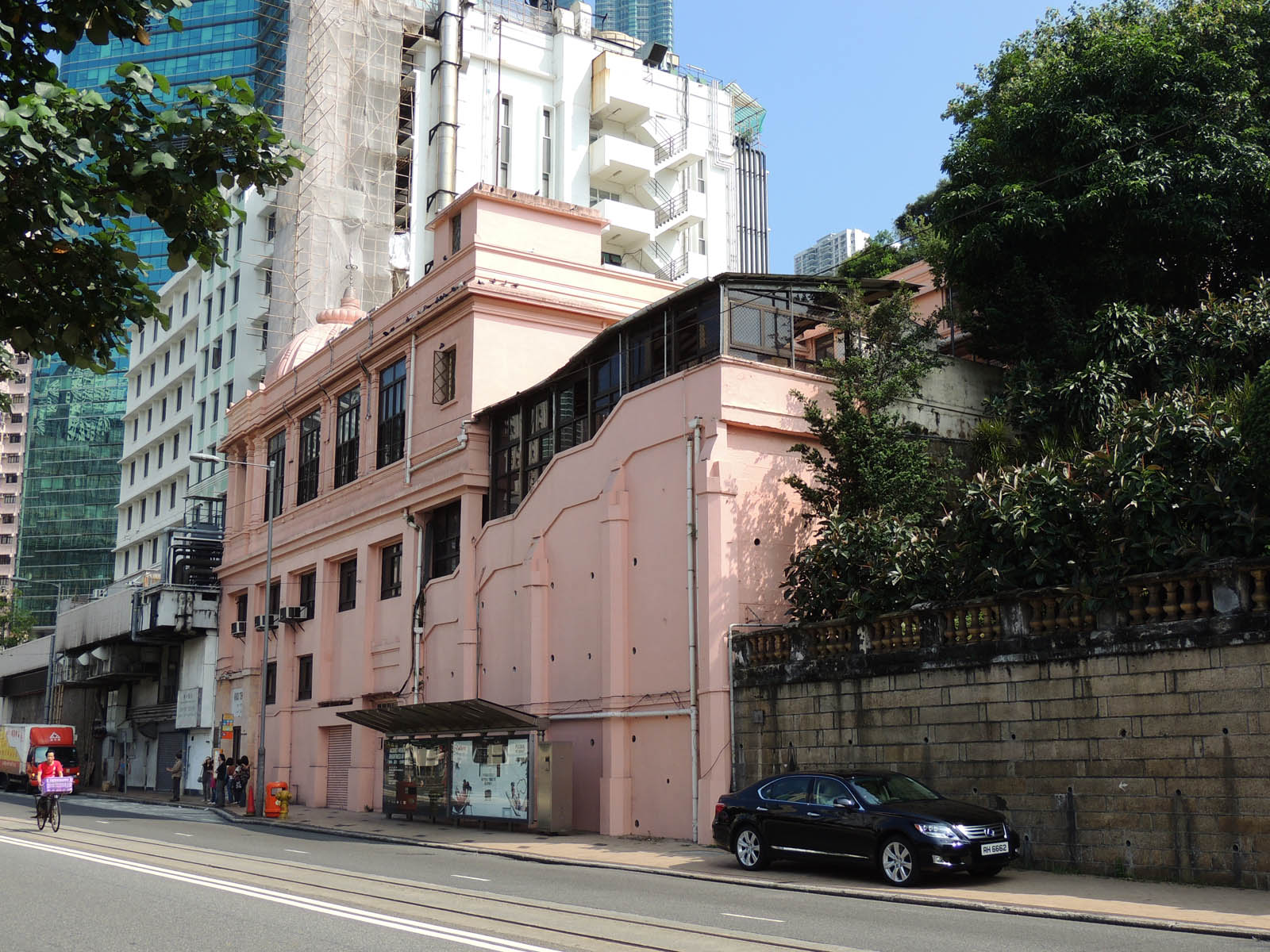 Hindu Temple, Happy Valley